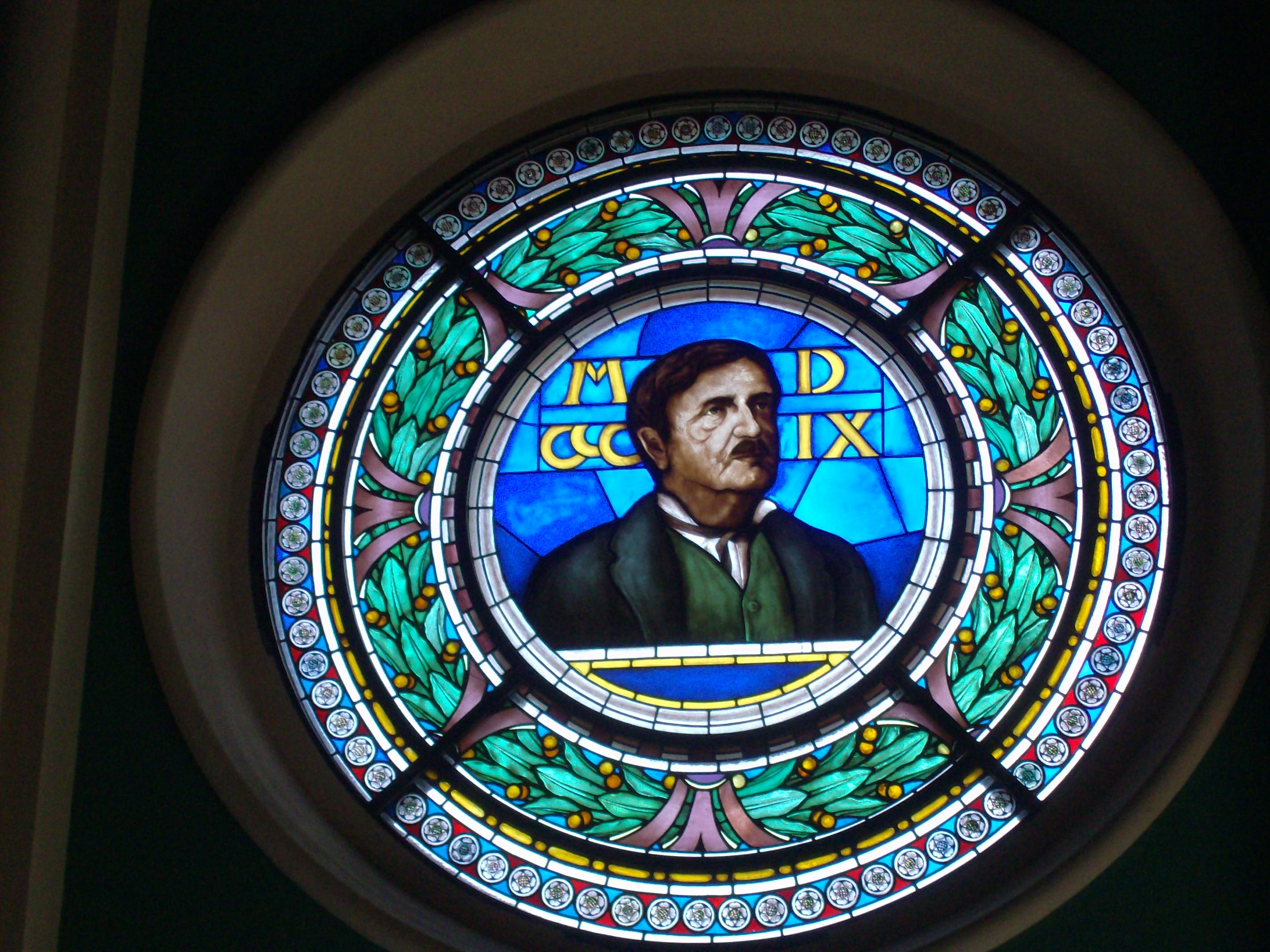 Rocchetta Mattei